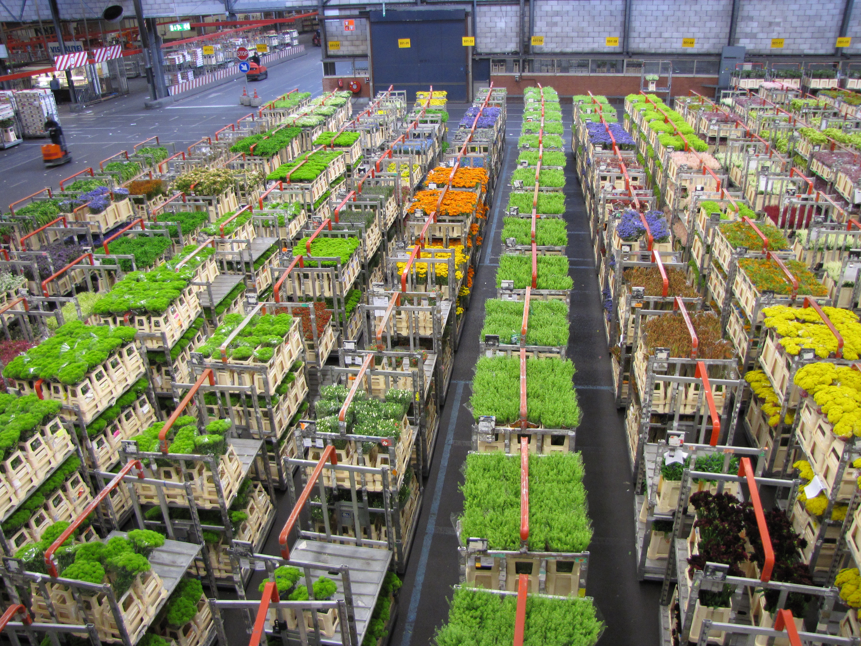 I Aalsmeer, Nederländerna, finns världens största blomstermarknad.